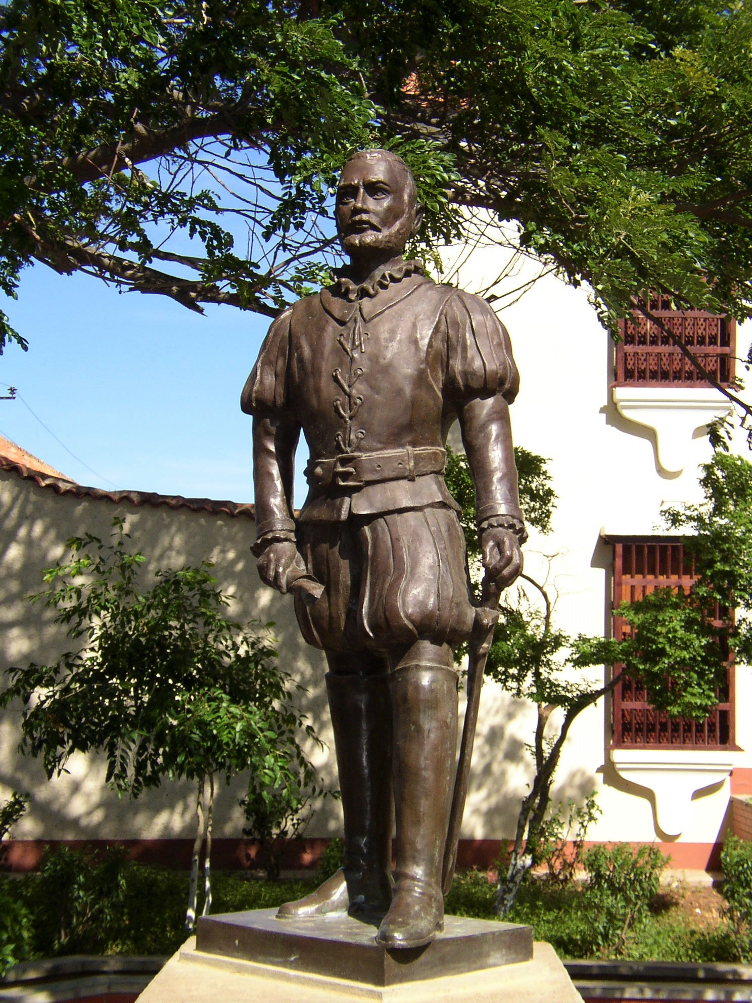 Juan de Ampies, Coro, Venezuela: Don Juan de Ampies a fundador de la que es hoy nuestra histórica ciudad de Santa Ana de Coro, primada de Venezuela en 26 de Julio de 1527.